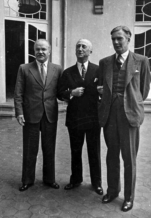 Potsdamer Konferenz, Molotow, Byrnes, Eden Zentralbild Potsdamer (Berliner) Konferenz der führenden Staatsmänner der drei alliierten Mächte der UdSSR, Grossbritannien und der USA vom 17. Juli bis 2. August 1945 in Schloß Cecilienhof und Babelsberg. Ihr Ergebnis ist das Potsdamer Abkommen, das die völkerrechtlichen Grundfragen für den Aufbau eines friedlichen, demokratischen deutschen Staates und die Politik der Siegermächte gegenüber Deutschland festlegt. UBz: die Außenminister der drei Großmächte, W.M. Molotow, J.F. Byrnes und Anthony Eden in einer Tagungspause. Abgebildete Personen: Byrnes, James F.: Außenminister, USA Eden, Anthony Sir: Außenminister, Großbritannien Molotow, Wjatscheslaw Michailowitsch: Außenminister, Sowjetunion (GND 11873461X) Information added by Wikimedia users.